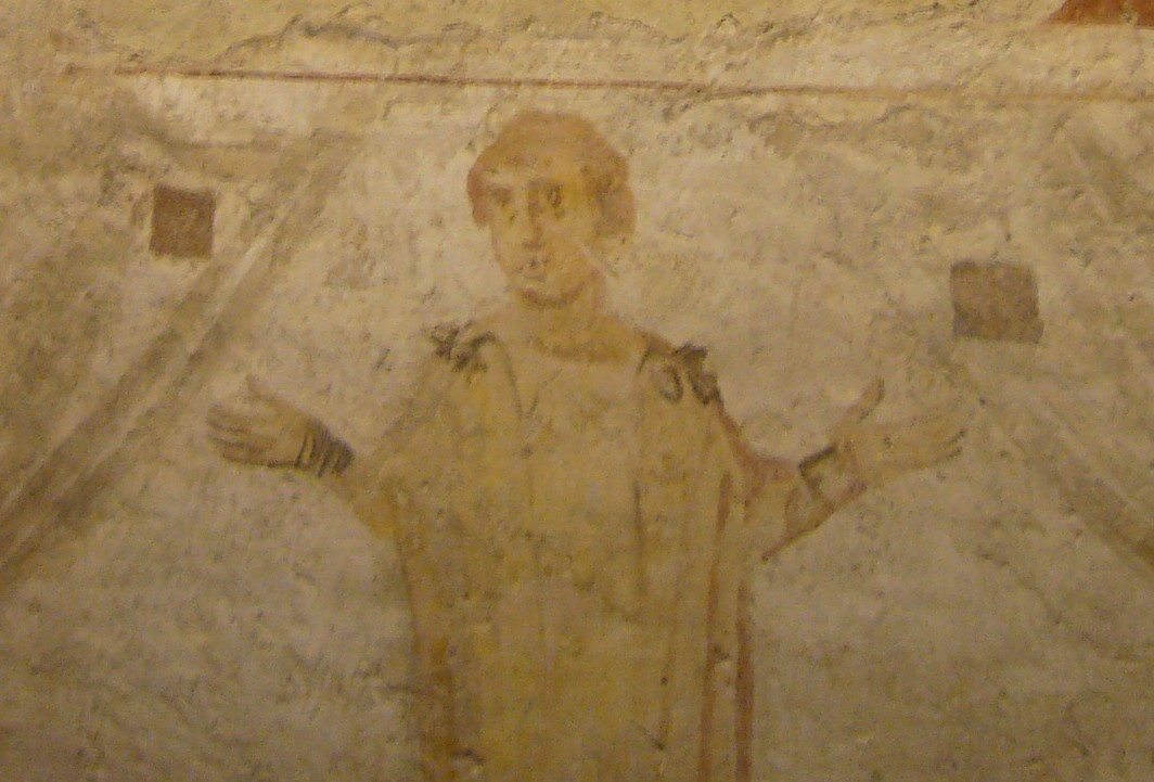 Roma, case romane del Celio - fenestella confessionis della basilica dei santi Giovanni e Paolo